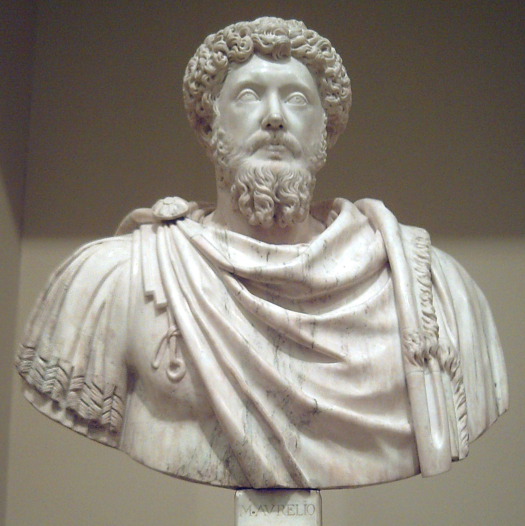 Marcus Aurelius